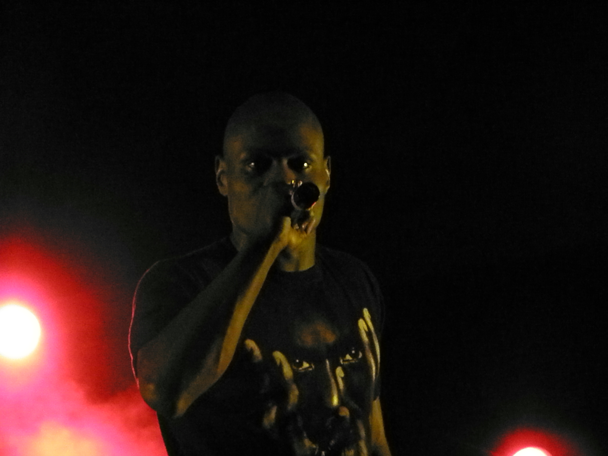 Kery James, Quartiers d'été, Rennes